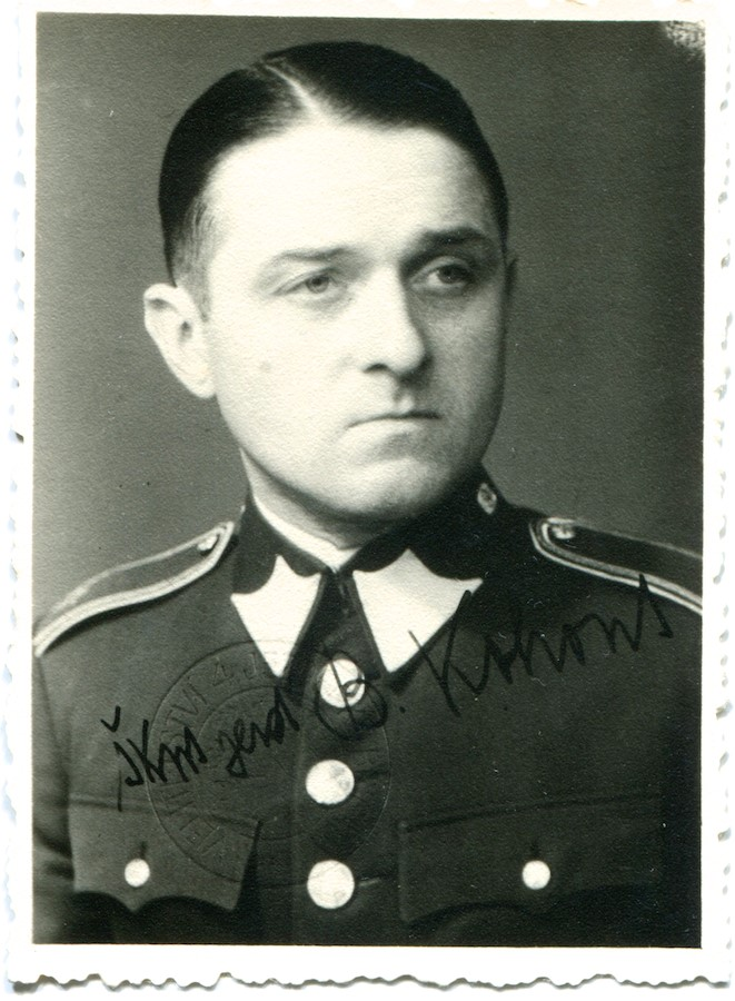 Služební fotografie škpt Bohuslava Kohouta z r. 1936